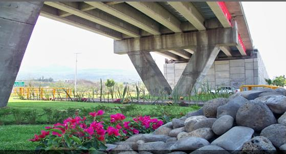 El puente de la Juarez recién remodelado